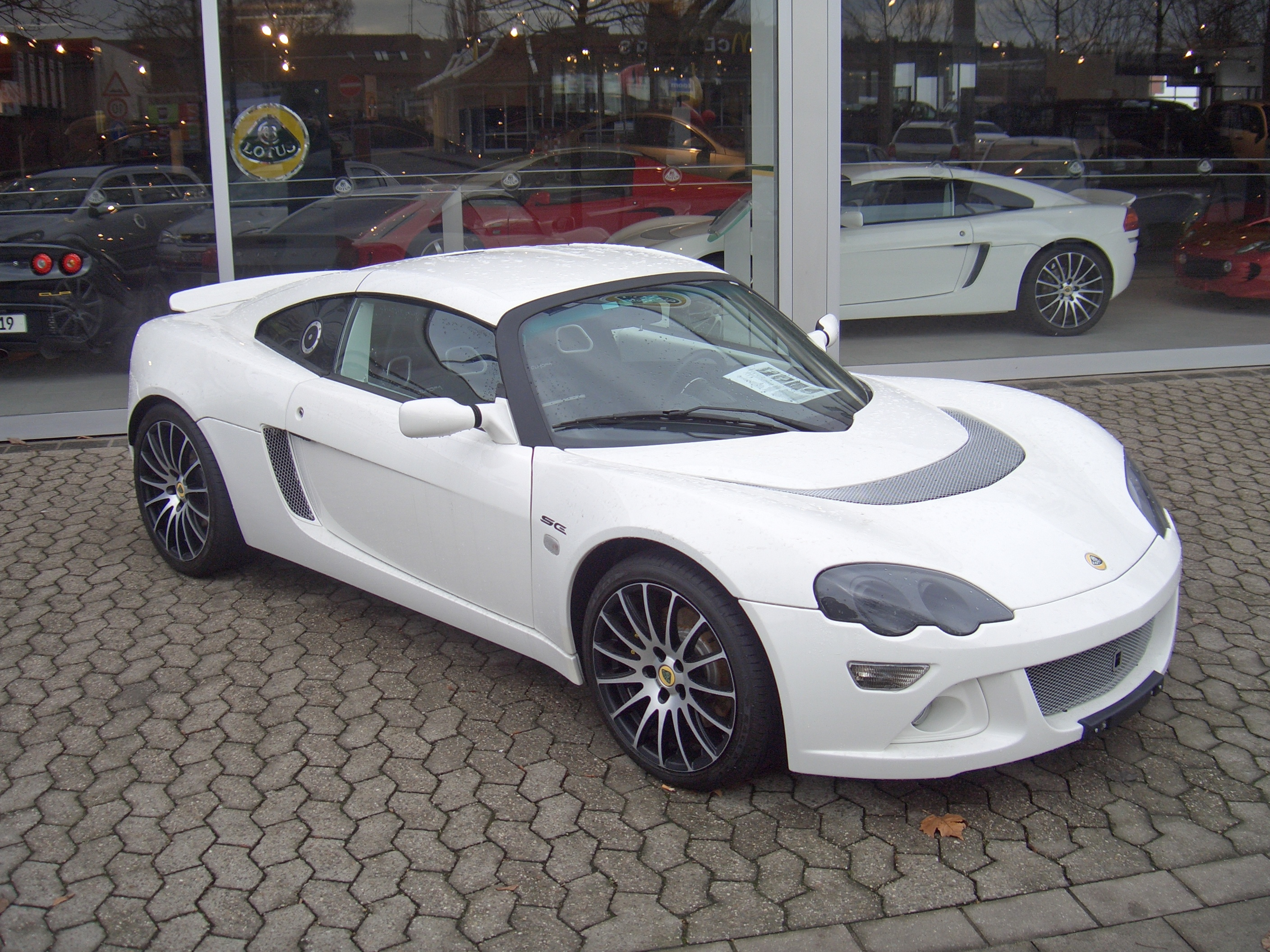 Lotus Europa SE (from 2008)